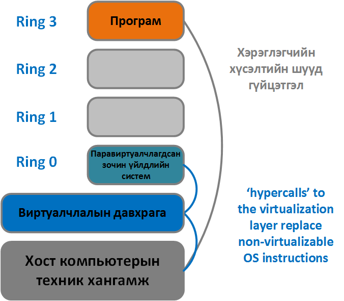 Монгол: Зураг 4 - Паравиртуалчлал